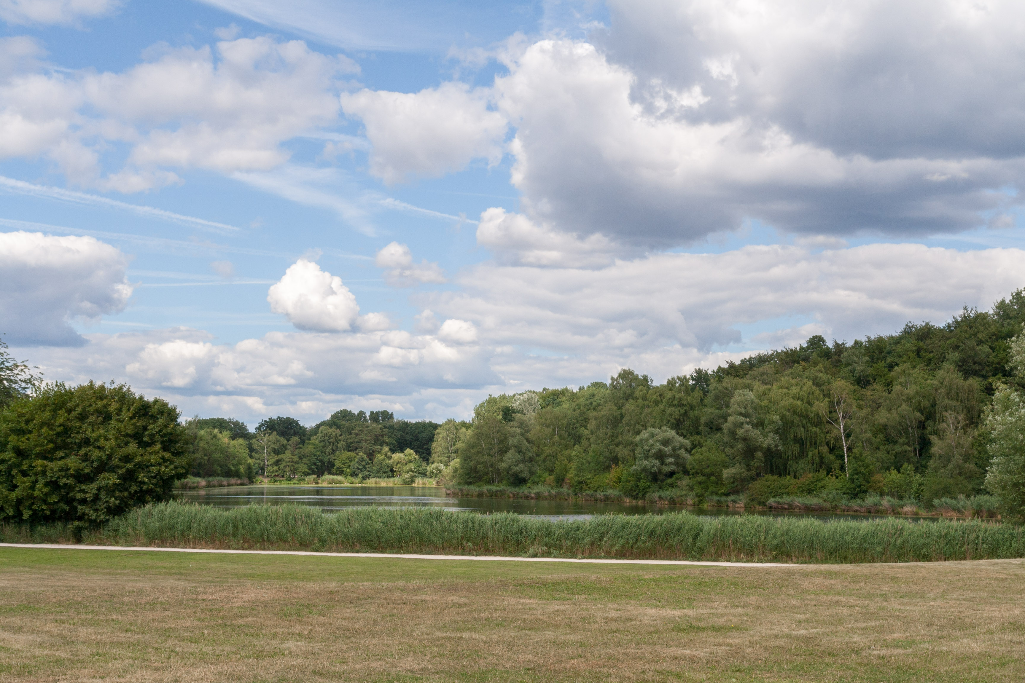 Silbersee, Nürnberg